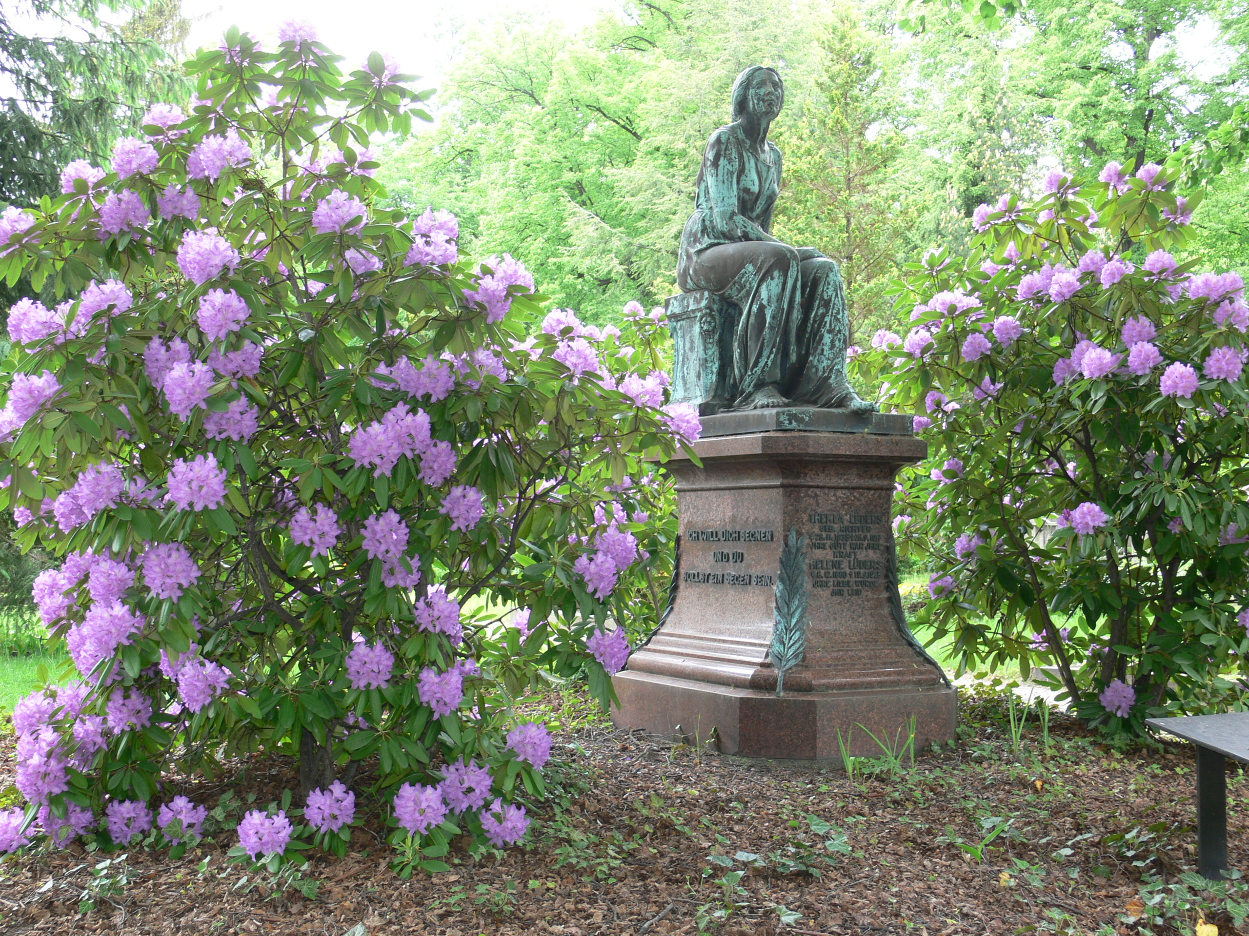 Familiengrabmal Lüders, Städtischer Friedhof, Görlitz